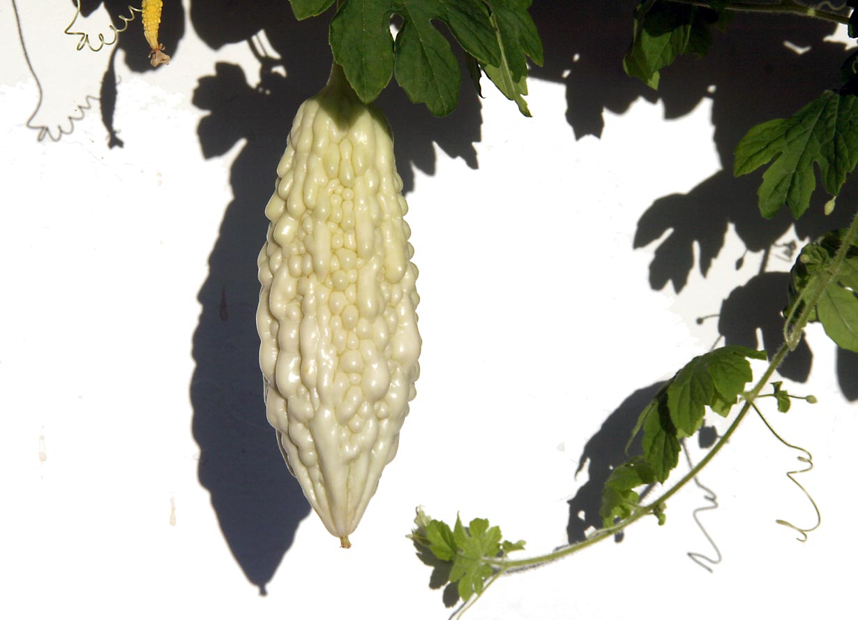 margose blanche